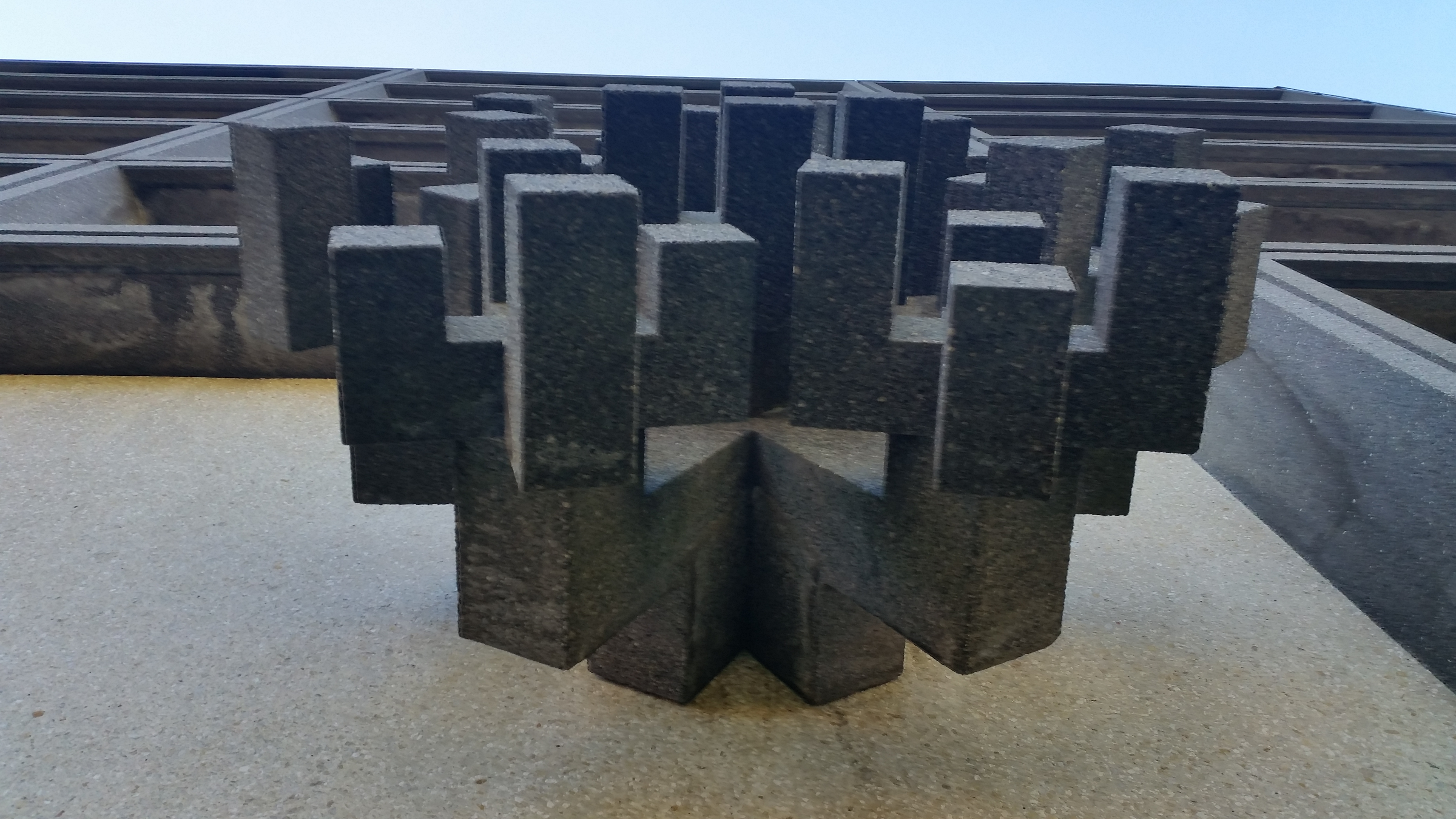 Van onderaf gezien: Straalcompositie